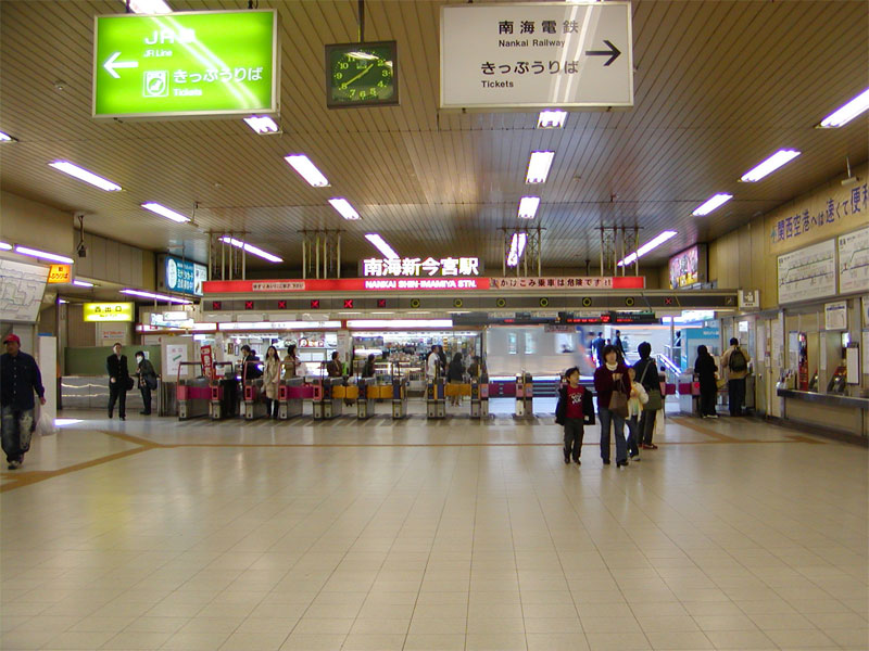 南海電鉄新今宮駅（大阪市西成区・浪速区）